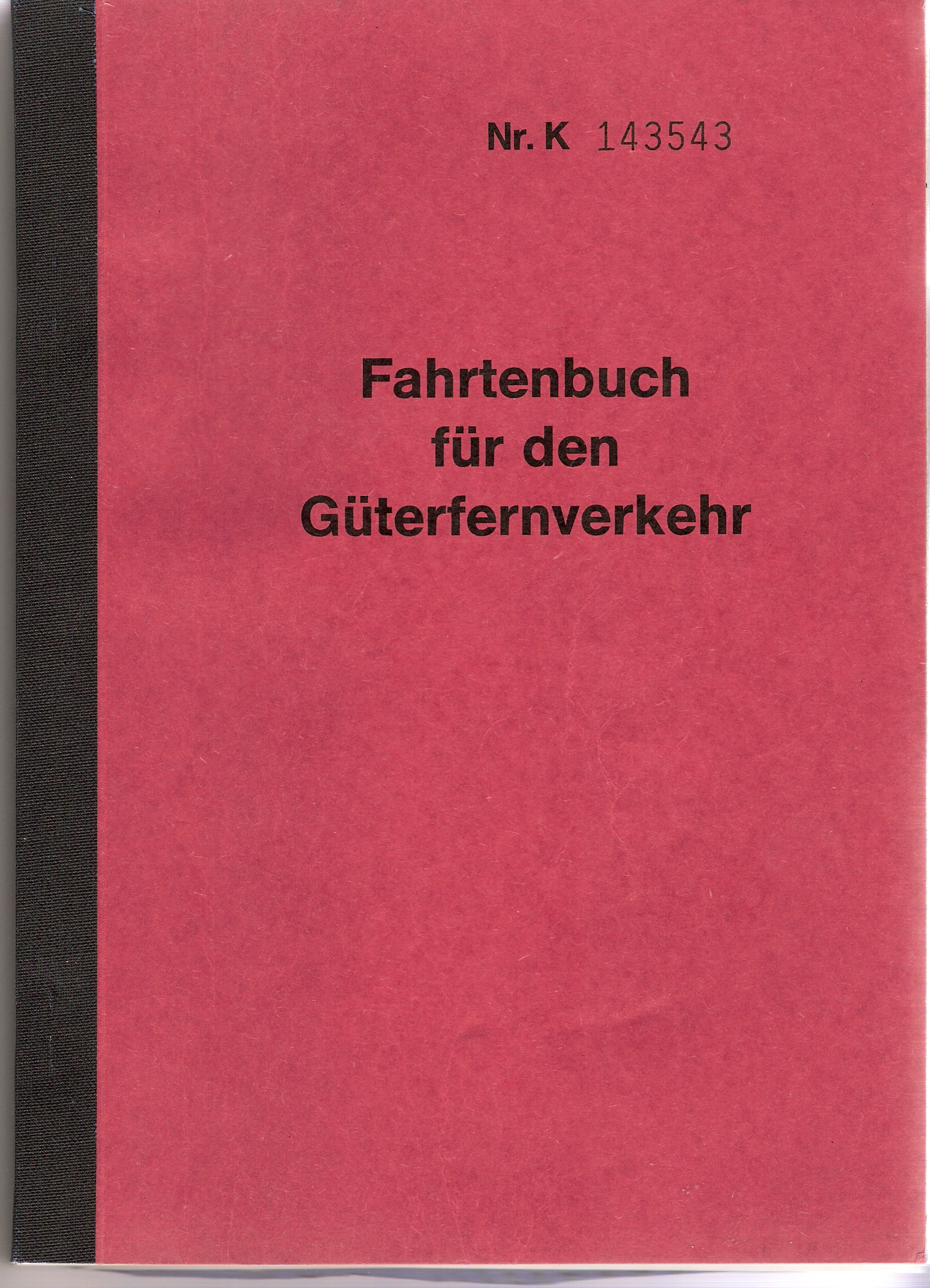 Fahrtenbuch Güterfernverkehr. Wurde oder konnte noch bis 1998 benutzt werden.